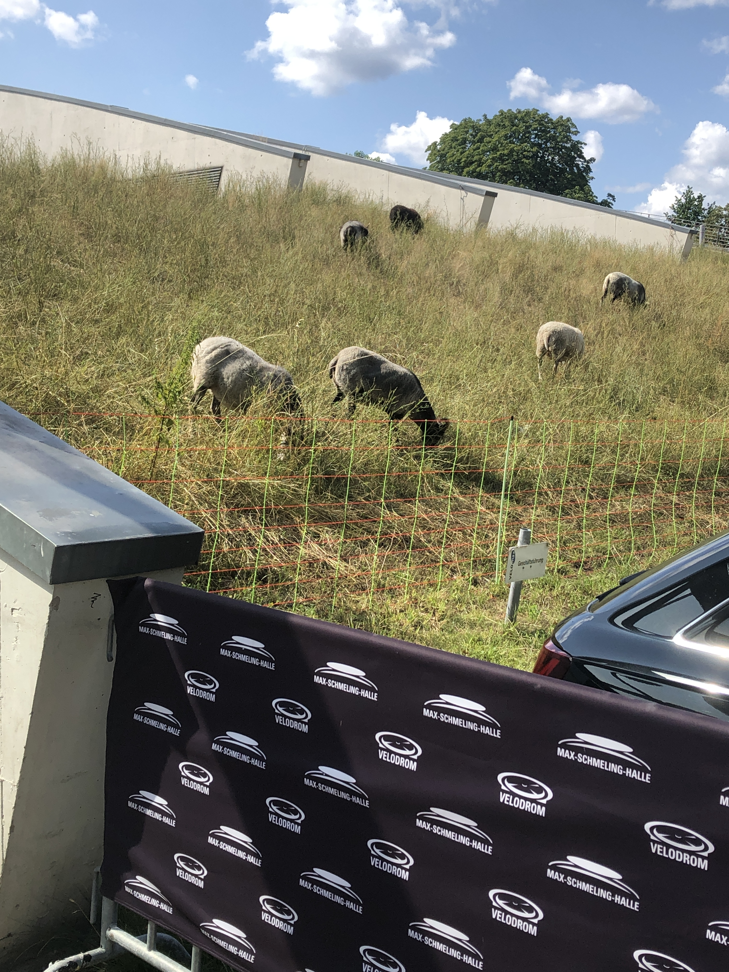 Im Sommer 2019 wurde zum Mähen des Rasens 15 Guteschafe eingesetzt. Weitere Infos dazu in einem Bericht der Berliner Woche